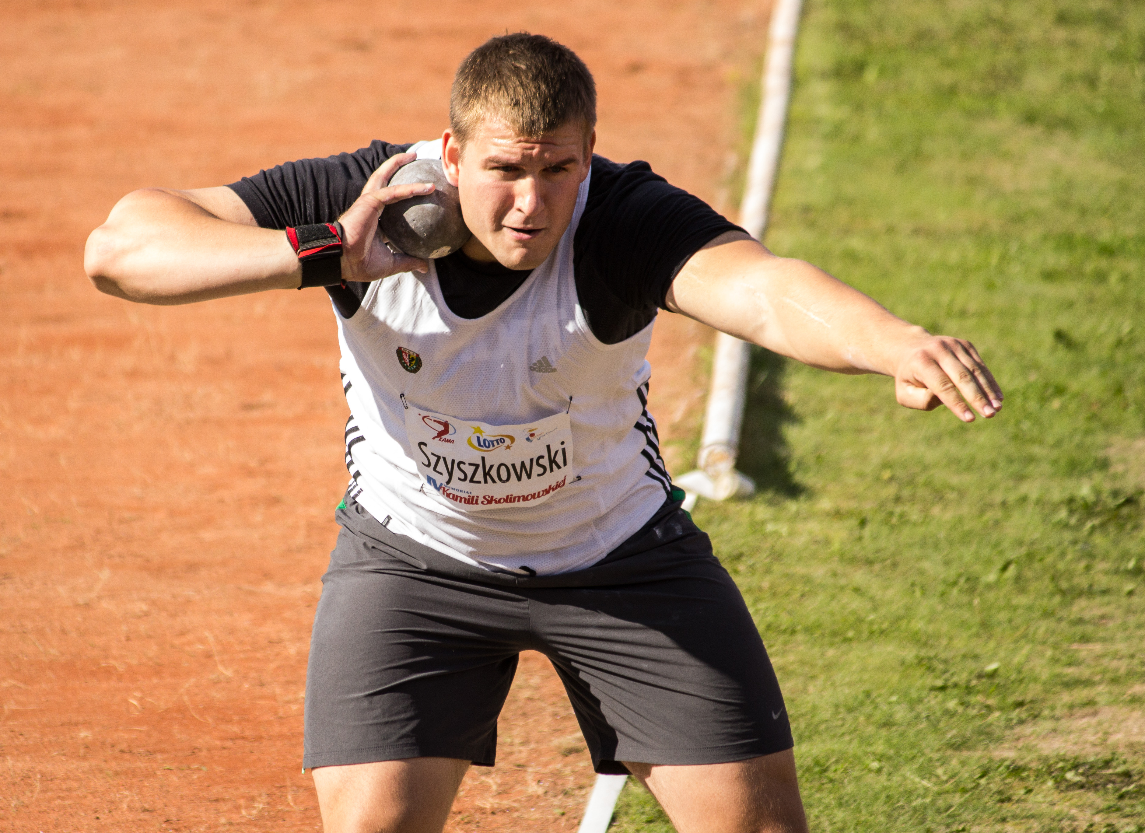 Memoriał Kamili Skolimowskiej w Warszawie, 2013-08-25